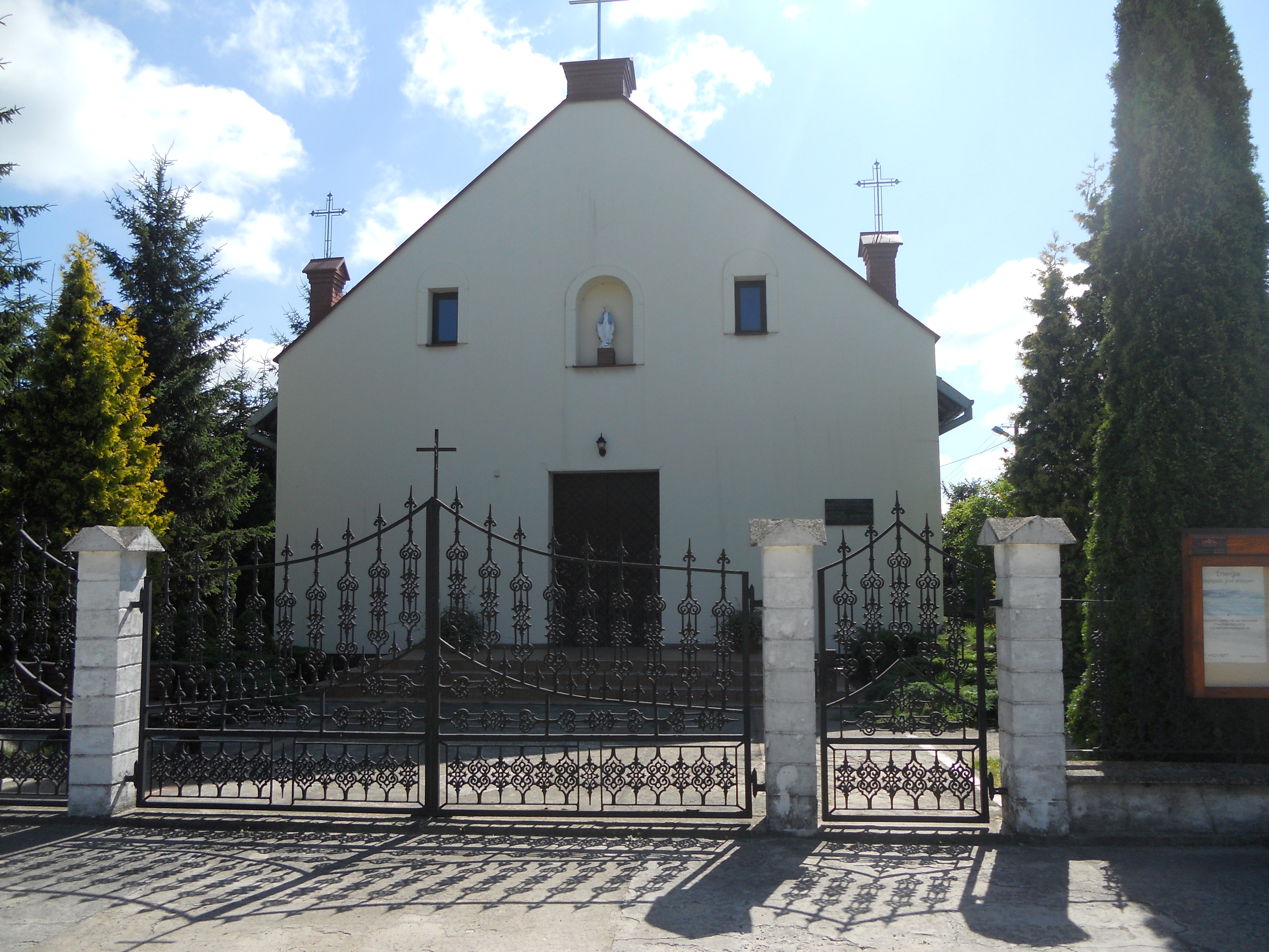 Kaplica w Rozcach